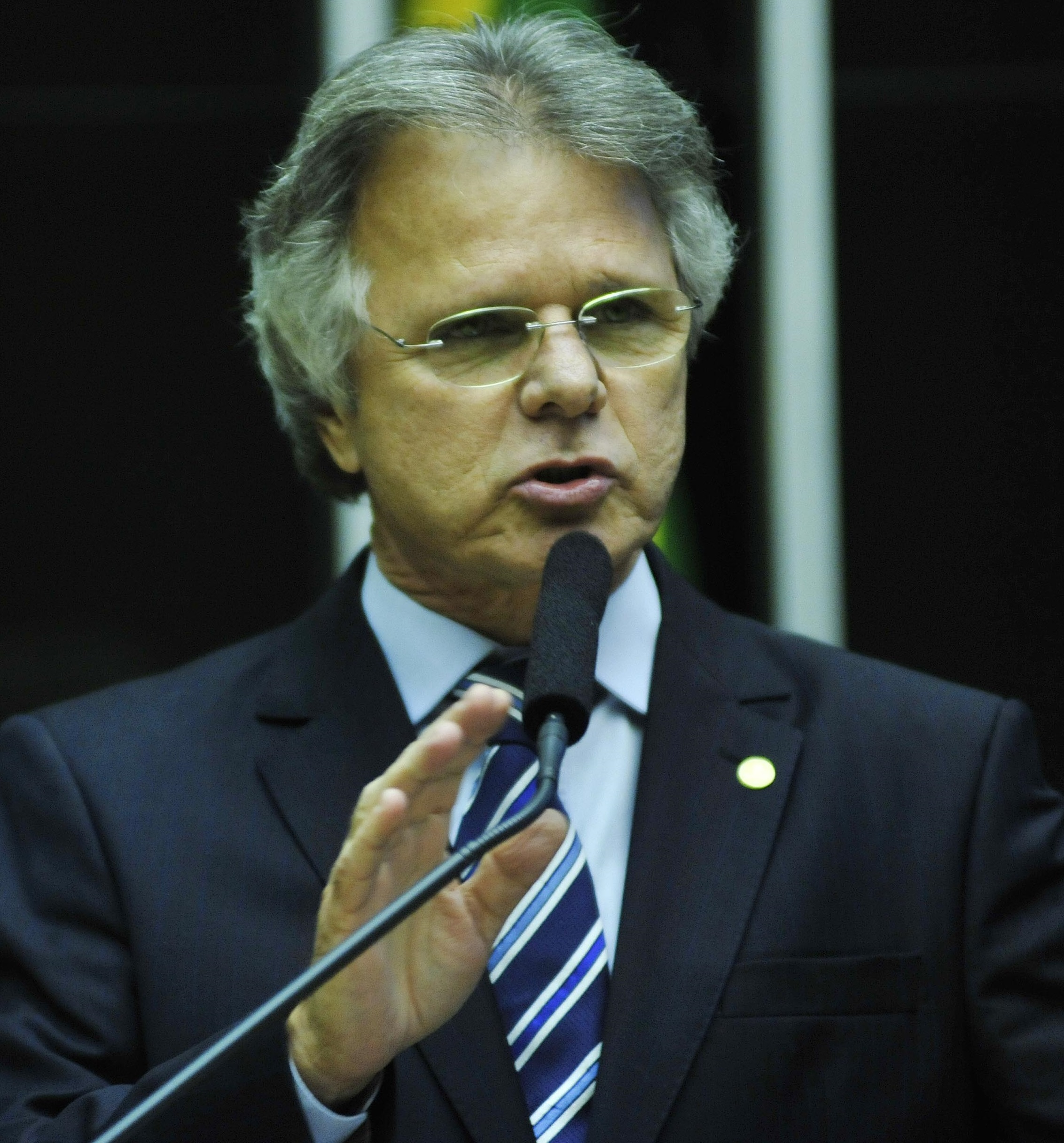 Vanderlei Macris em fevereiro de 2015.